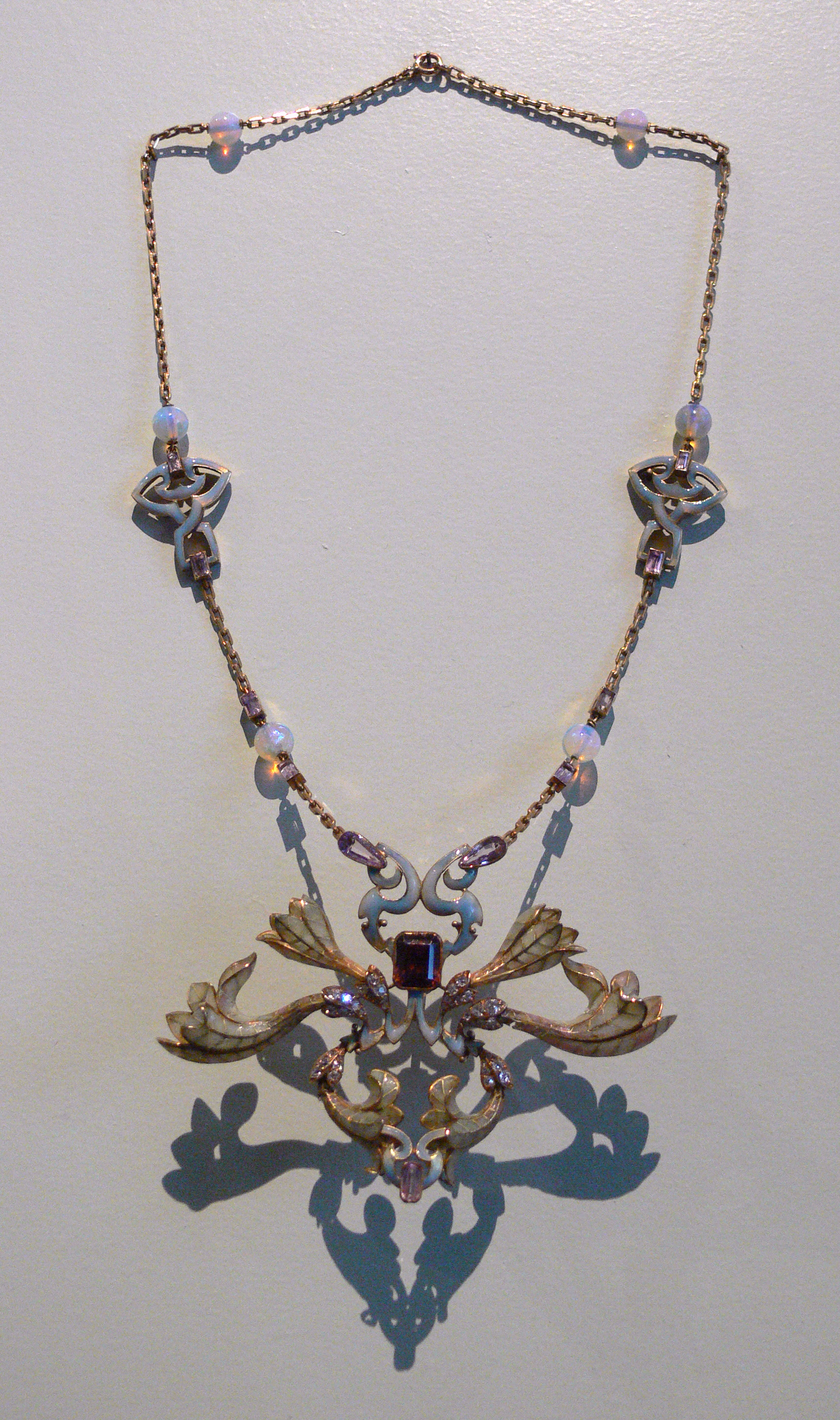 Philippe Wolfers: Anhänger „Freesien“, Brüssel 1900 Gold, Diamanten, Hyacintz, Kunzite, Opale, Email Bayerisches Nationalmuseum, München; Dauerleihgabe Dr. Franziska Müller-Papst und Dr. Werner Wiemer, München; Inv. Nr. 2006/35.1-2